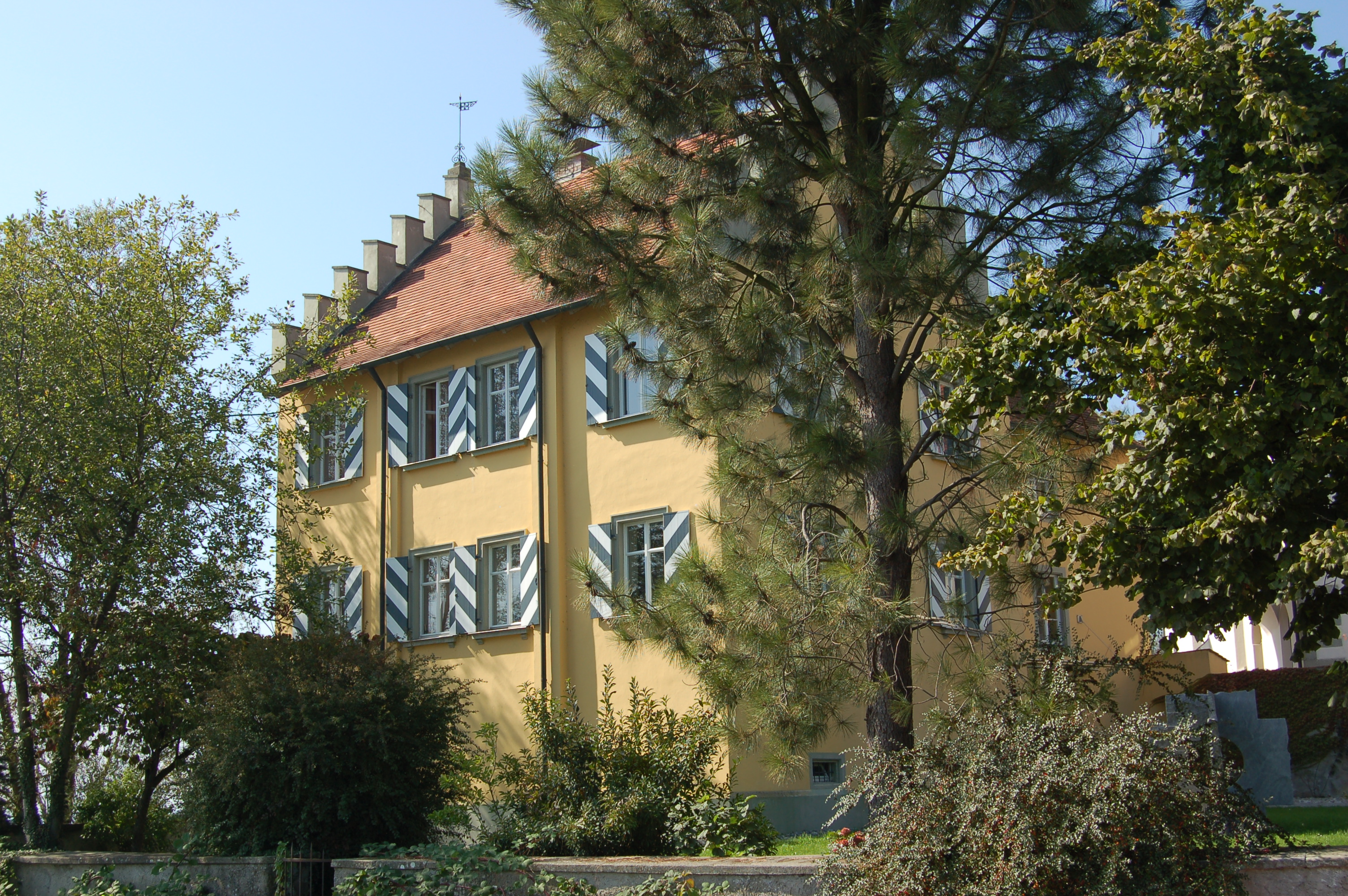 Sieht durch seine Staffelgiebel wie ein kleines Schloss aus.